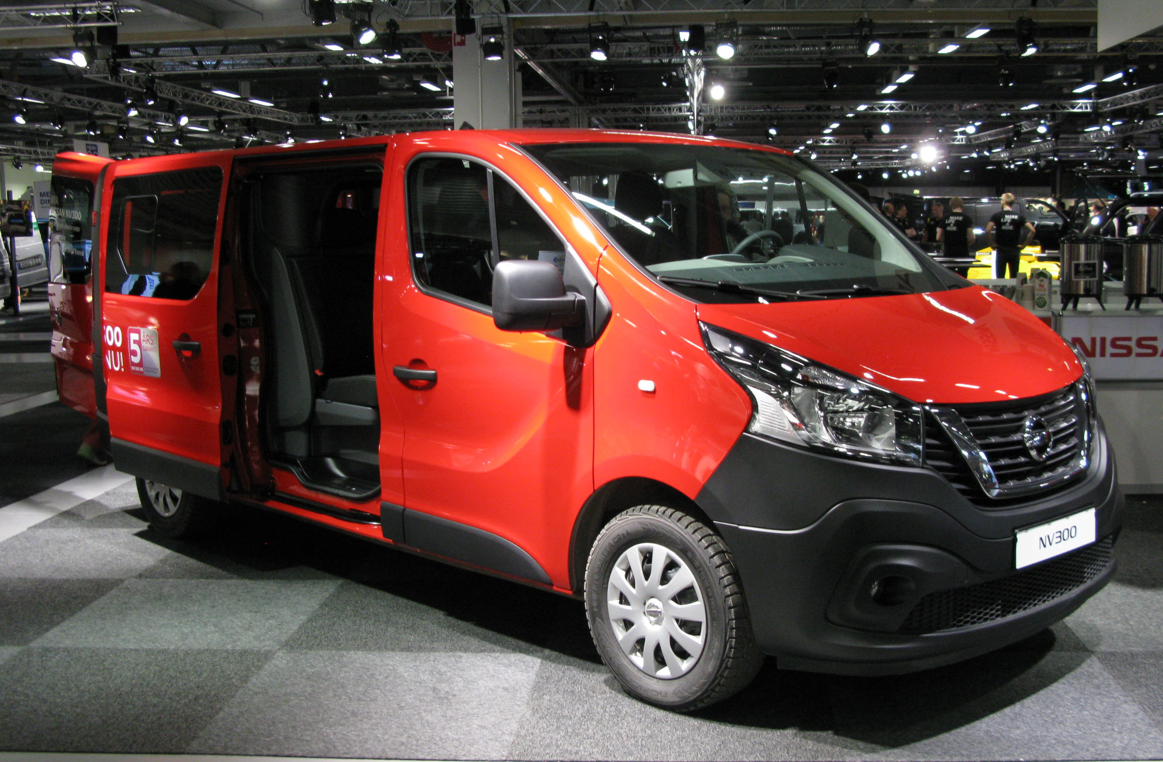 2017 Nissan NV300